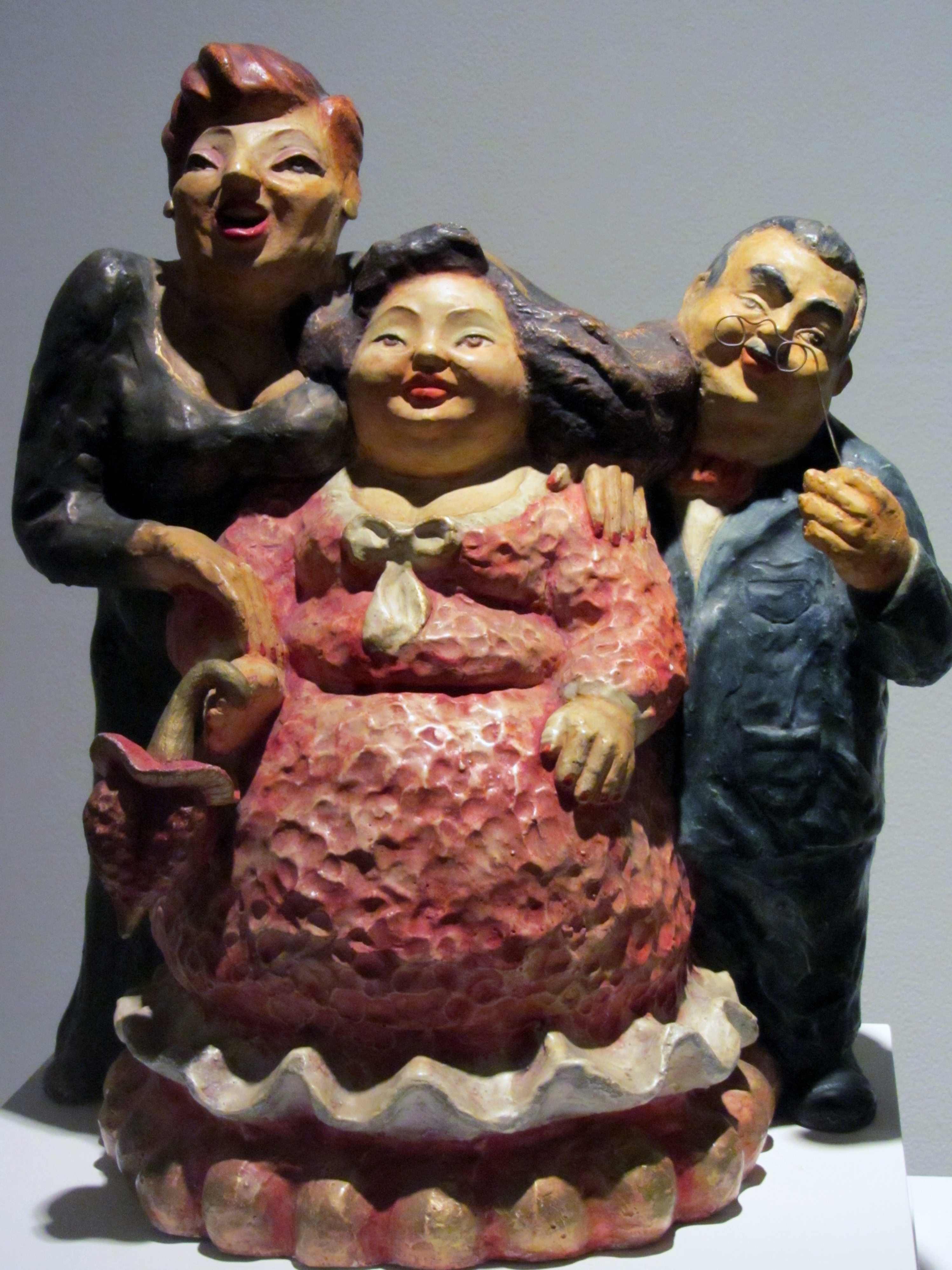 La foto de sus quince años, de Leda Astorga